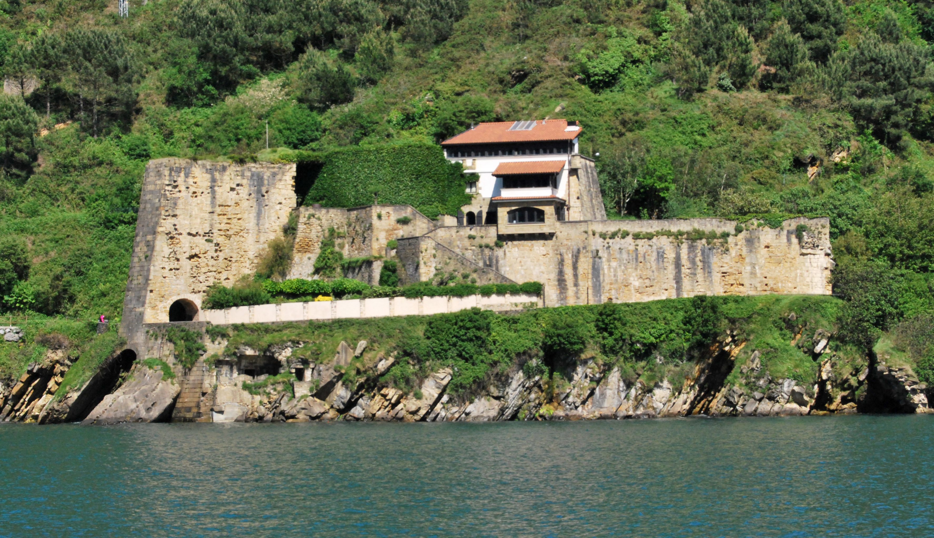 El Castillo de Santa Isabel en el puerto de Pasaia